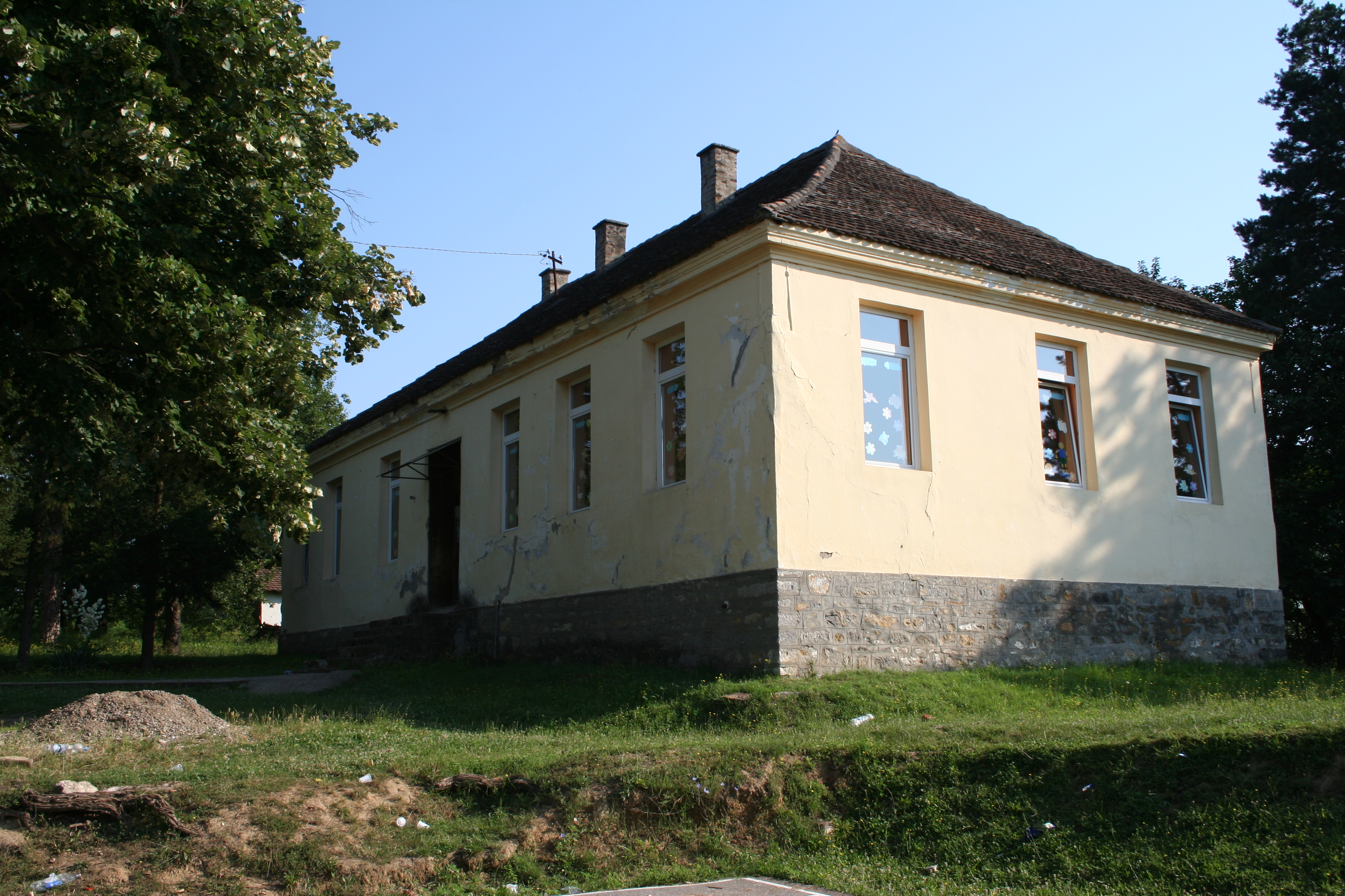 Zgrada škole, Desić